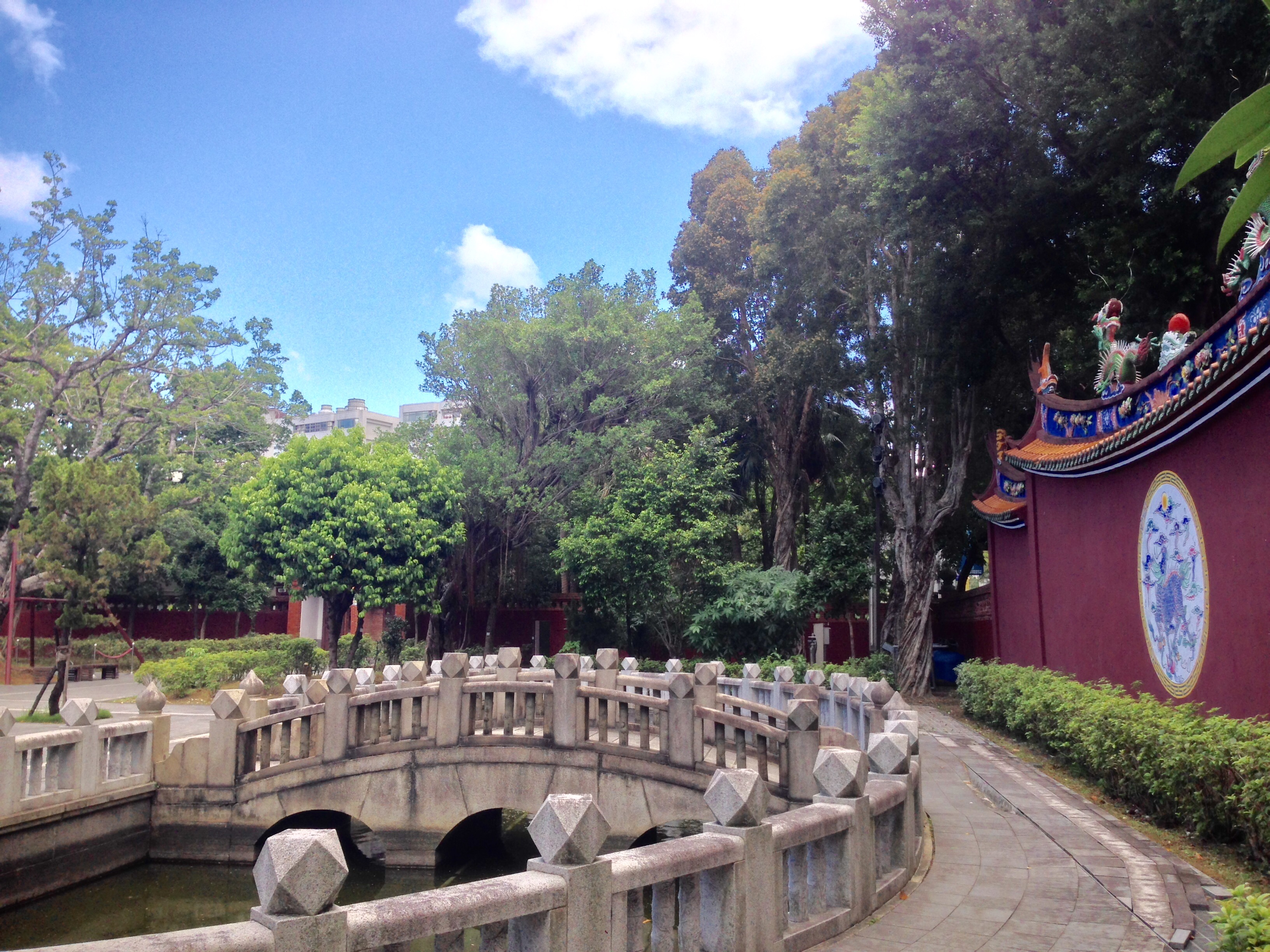 中文（台灣）: 台北孔子廟泮池